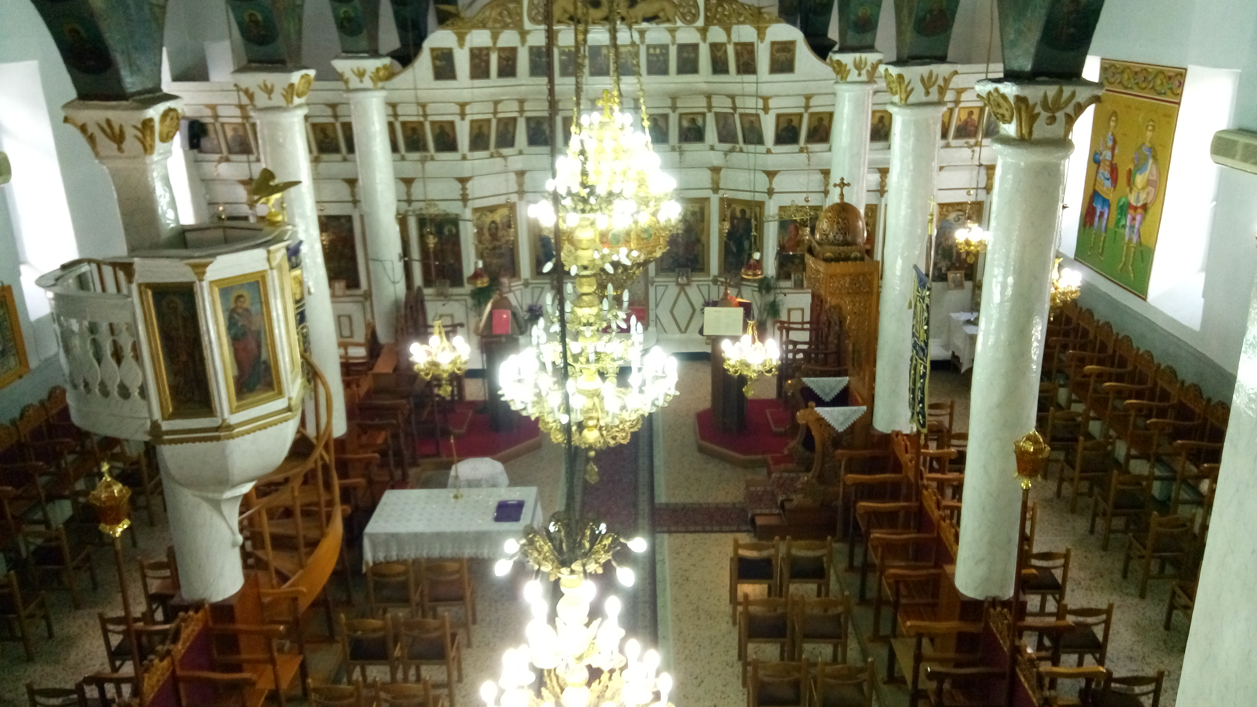 Ναός της Κοιμήσεως της Θεοτόκου